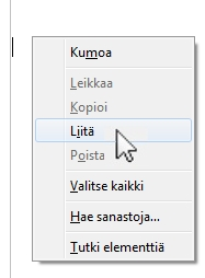 Leikepöytä2